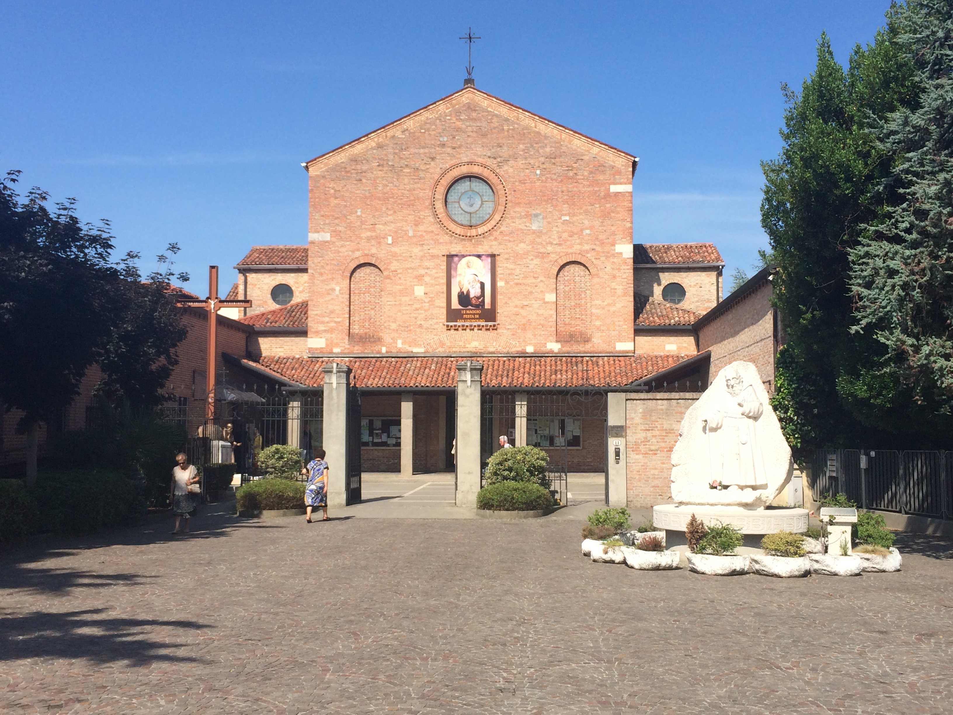 Padova - San Leopoldo Mandic